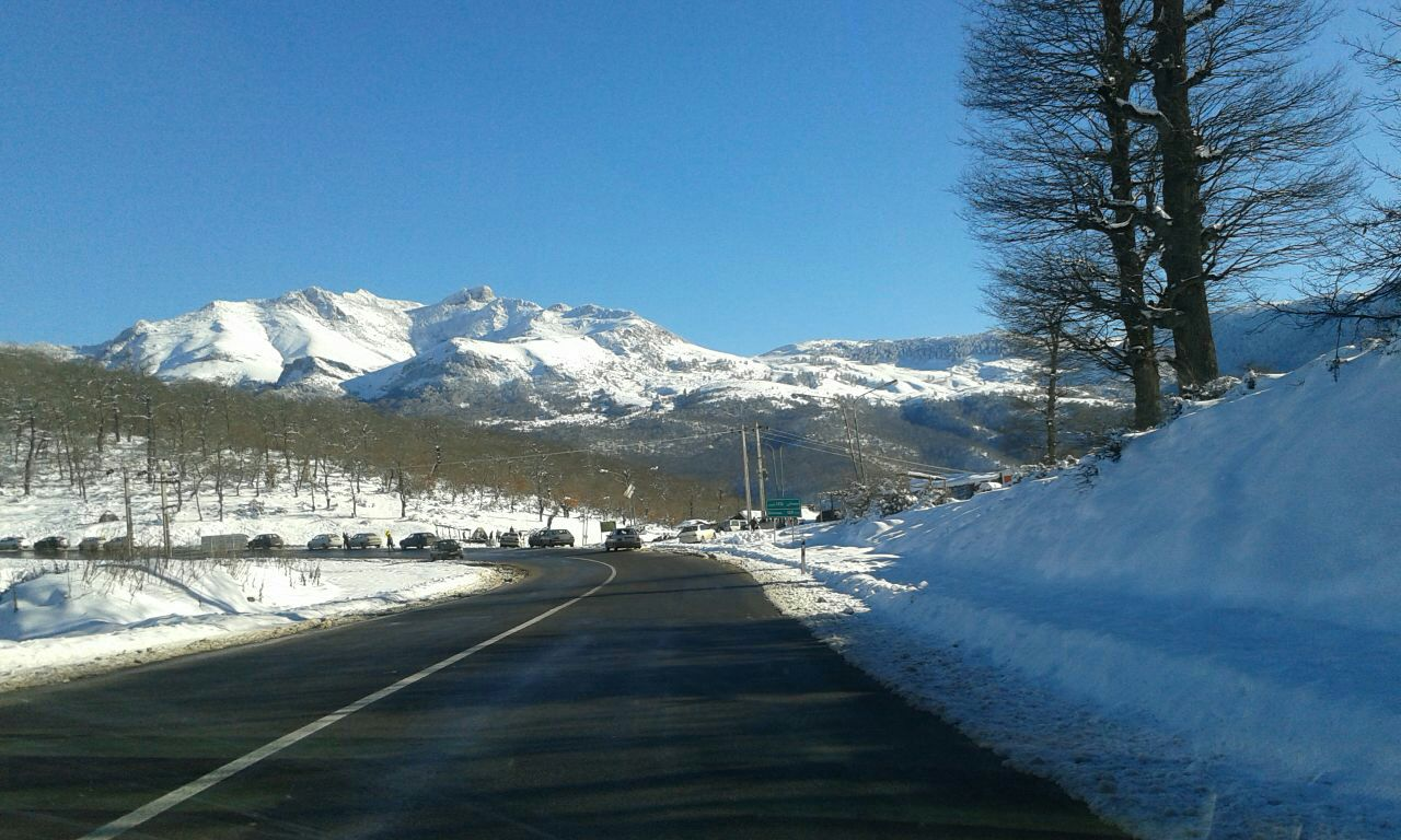 چکاد شاهدژ